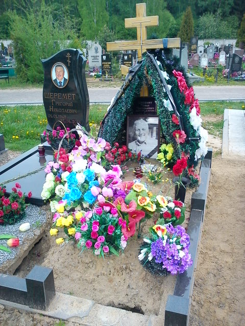 Павел Шеремет - место захоронения на Северном кладбище г.Минска, 30 мая 2017.